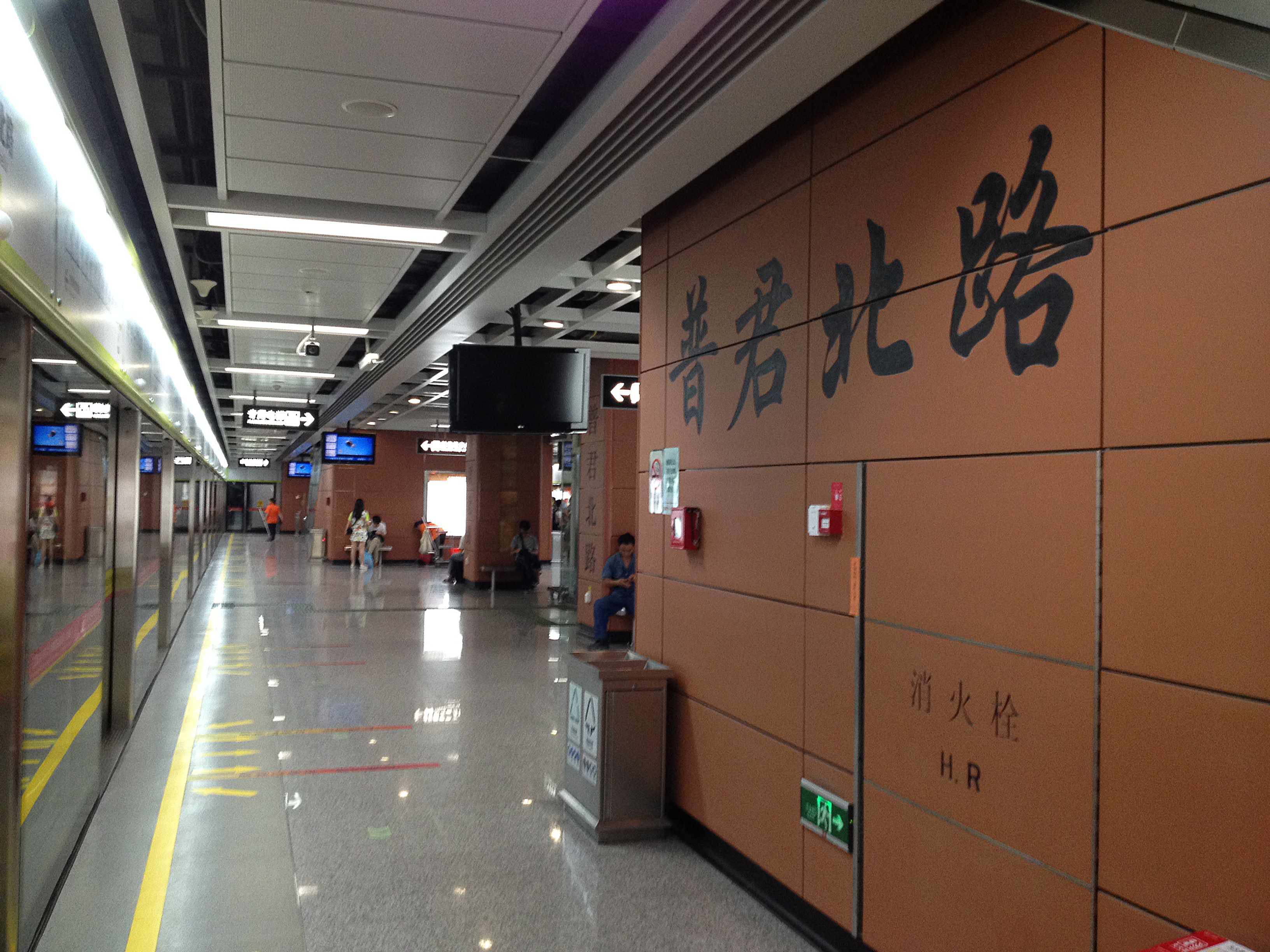 广佛地铁普君北路站往魁奇路之月台